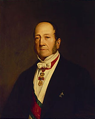 Der Dargestellte trägt unter seinem Frack die rot-grüne Schärpe des St. Stephansordens, am Anzugrevers hat er den Orden selbst angesteckt. Um den Hals gebunden, schmückt ihn der Orden vom Goldenen Vlies. Der breite Wangenbart ist als modisches Attribut der Zeit zu werten. Sein aufmerksamer Blick ist direkt auf den Betrachter gerichtet.